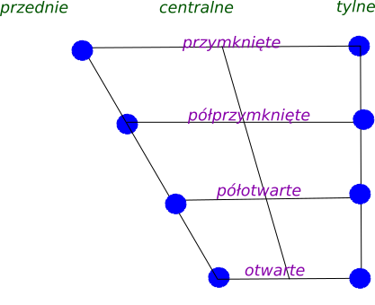 goły diagram